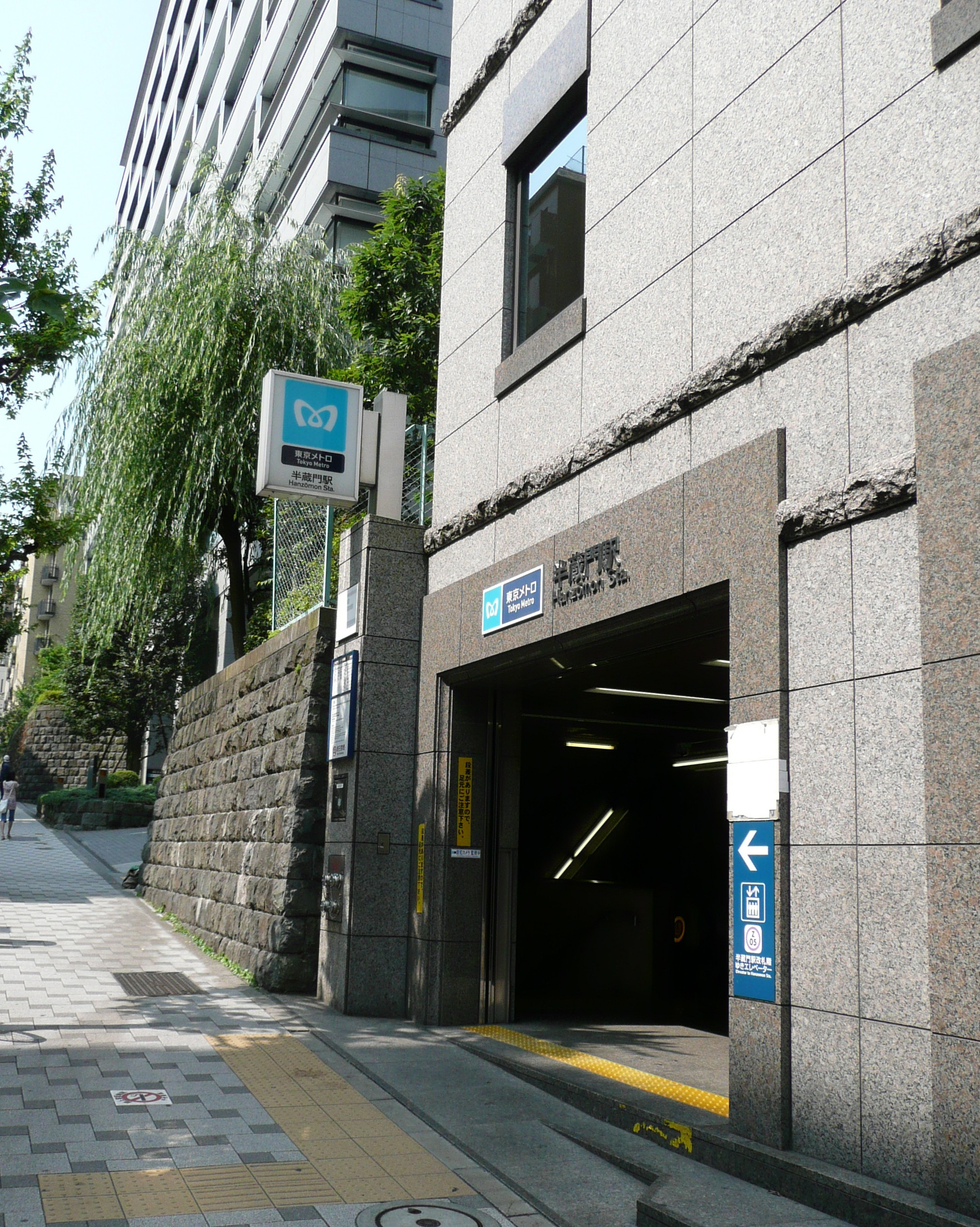 半蔵門駅5番出入口